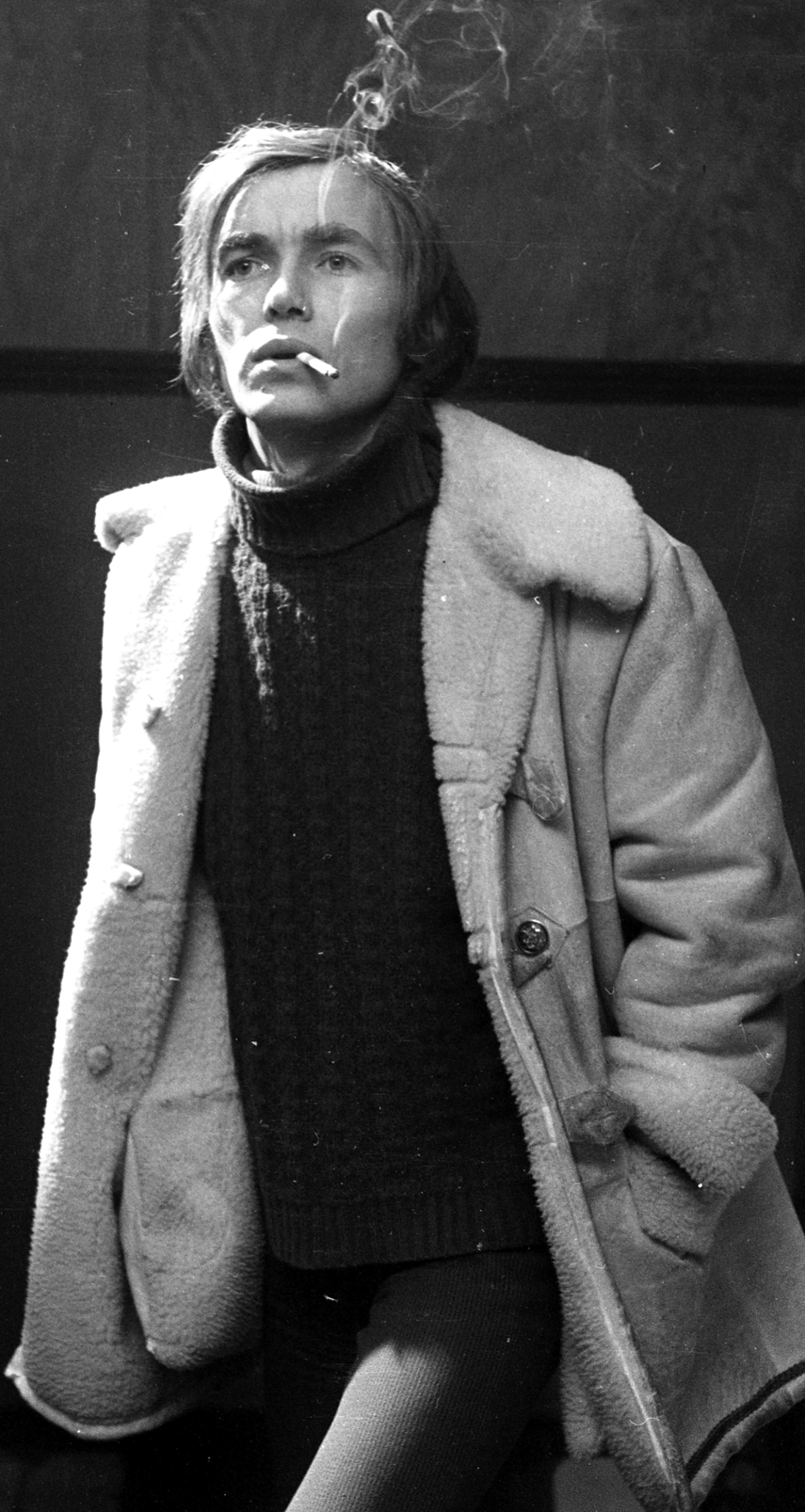 Kozák András (Vencsellő, 1943. február 23. – Budapest, 2005. február 24.) Kossuth- és Jászai Mari-díjas magyar színész, művészeti vezető.